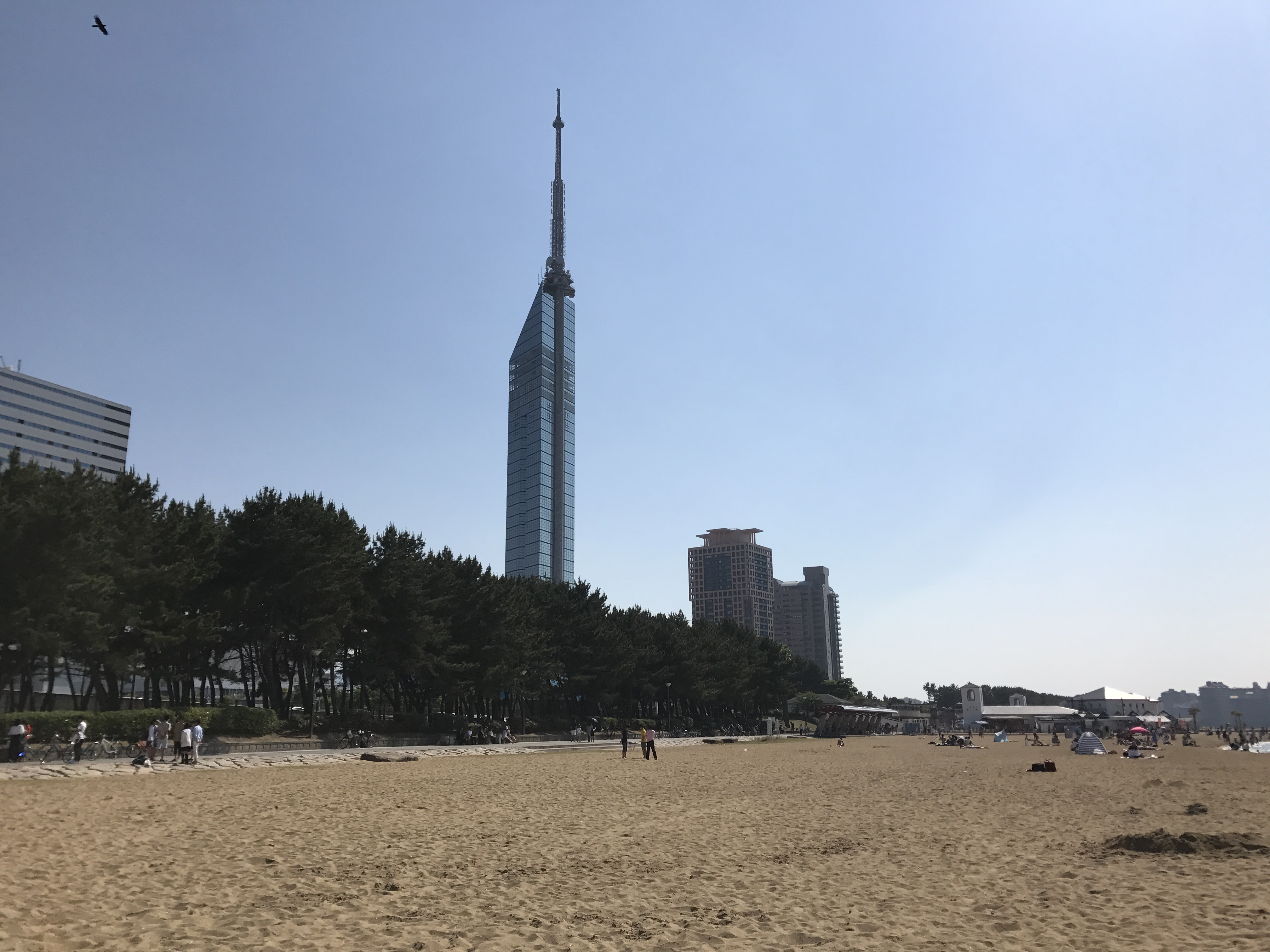 シーサイドももち海浜公園より望む福岡タワー